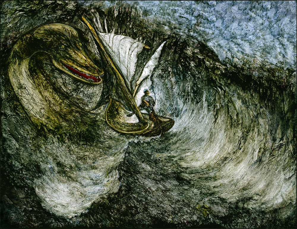 Loch Ness Monster, Seasnake, Seamonster, Seeschlange, Meeresungeheuer